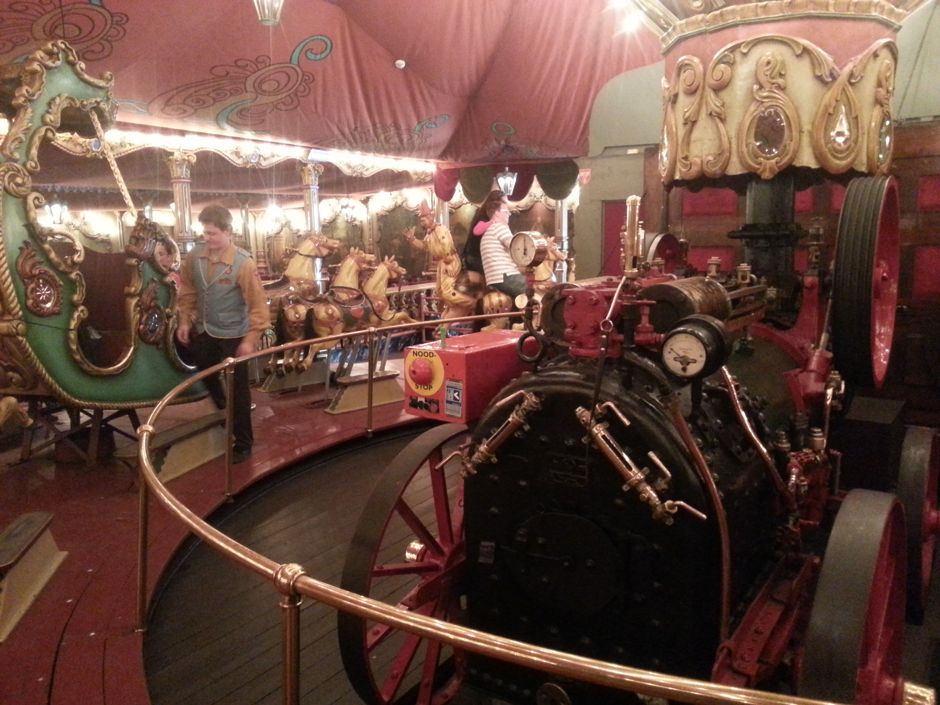 De (voormalige) stoommachine in de stoomcaroussel in het Marerijk.